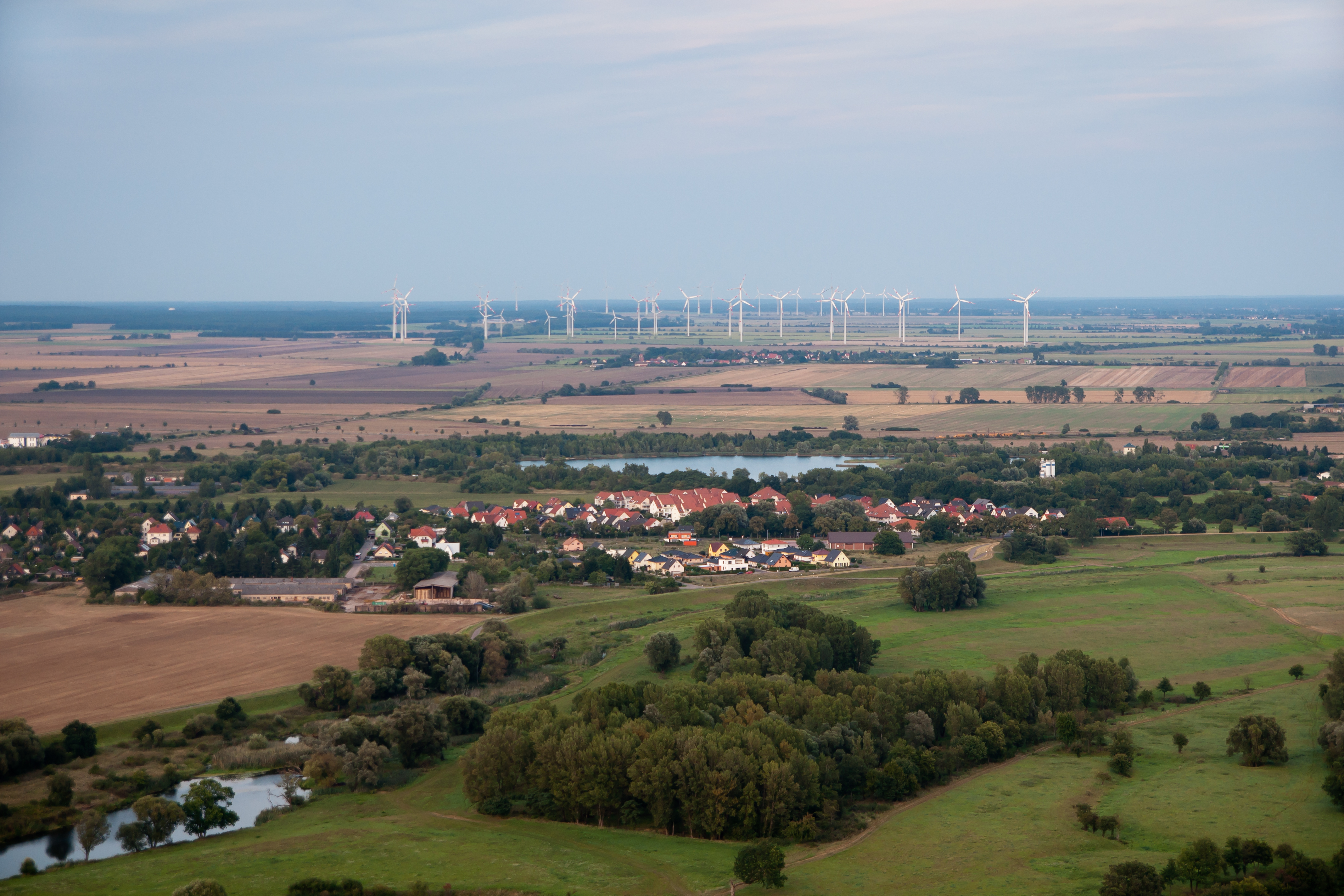 Luftbild von Neu Königsborn, Im Hintergrund der Windpark Spitzer Berg